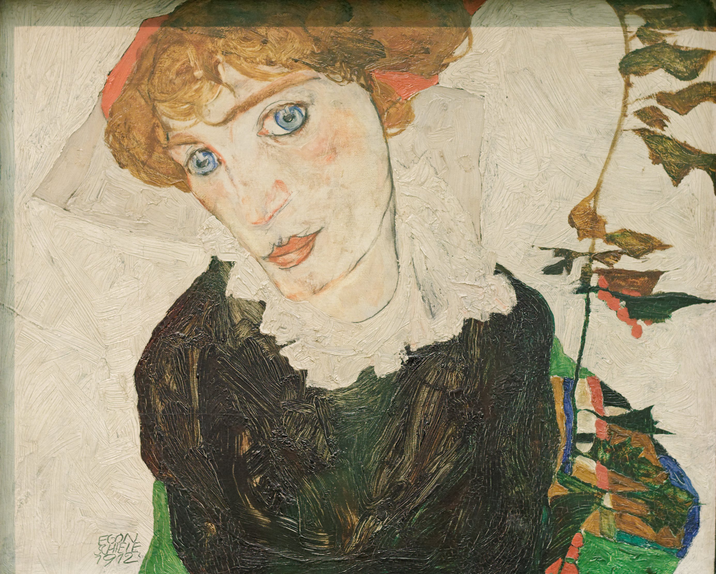 Portrait de Wally Neuzil. Huile sur bois, Egon Schiele 1912. Exposé au Leopold Museum, Vienne (Autriche). Inv.Nr 453